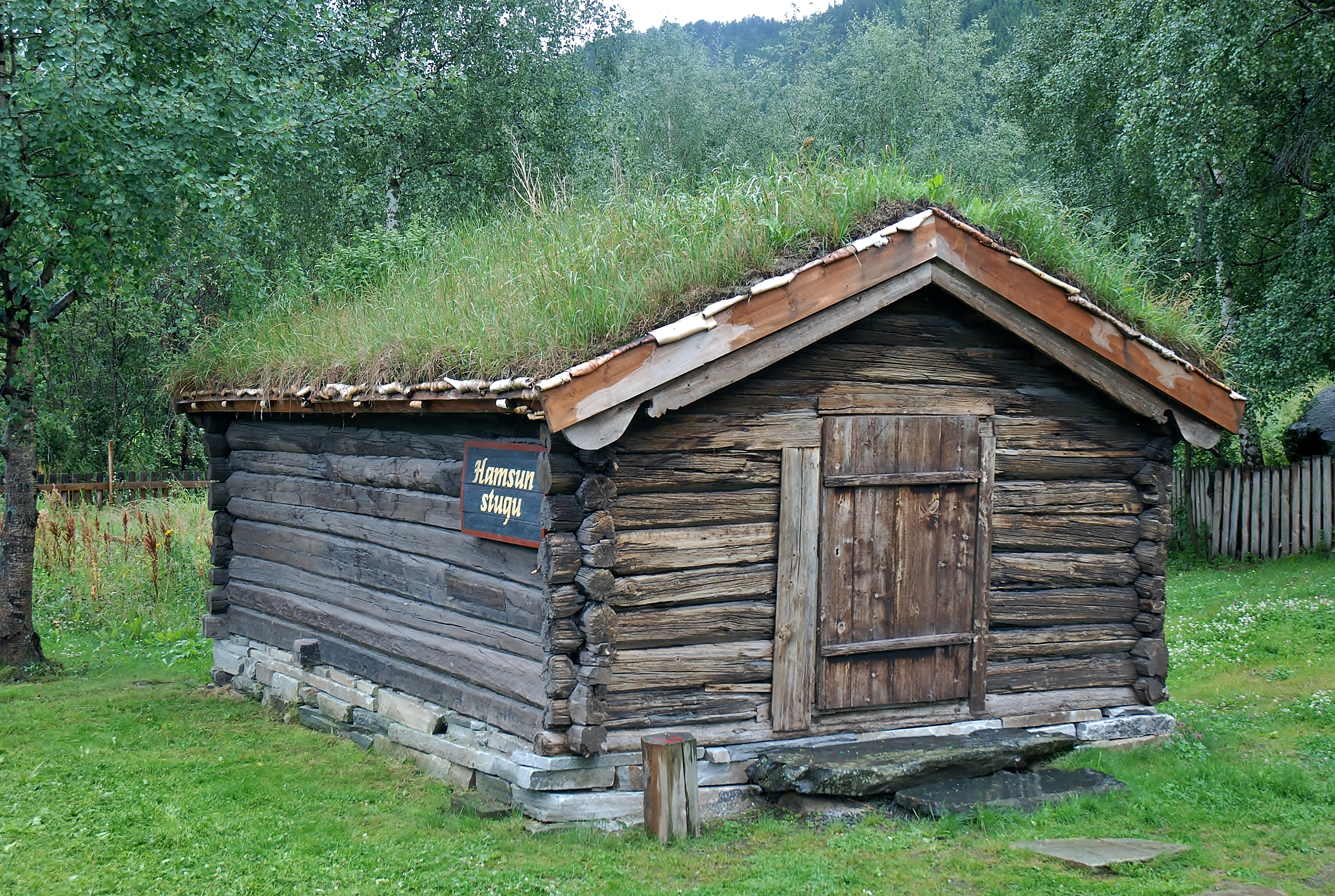 Huset der Knut Hamsun vart fødd 4. august 1859. Det ligg tett ved Rv 15 på Garmotræet i Lom kommune.